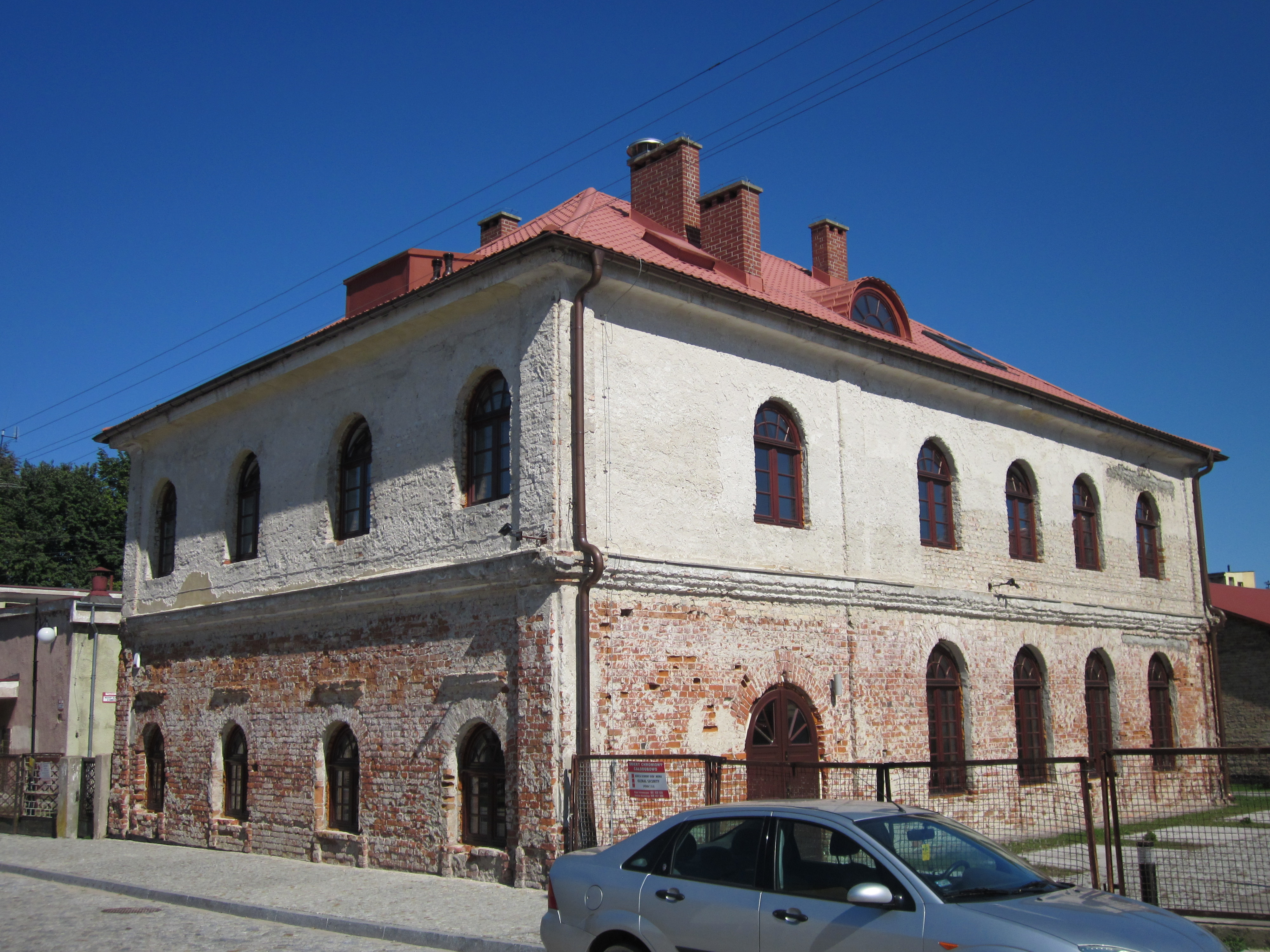 Budynek ten znajduje się przy ul. Mostowej 6. Obecnie trwają pracę adaptacyjne tego budynku na Dom Kultury.